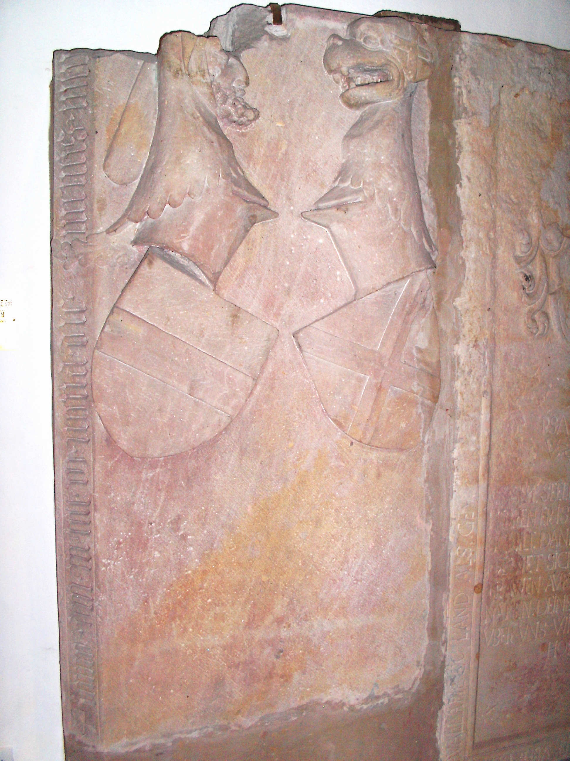 Grabstein Elisabeth von Oettingen (+ 1406), Stiftskirche Neustadt an der Weinstrasse